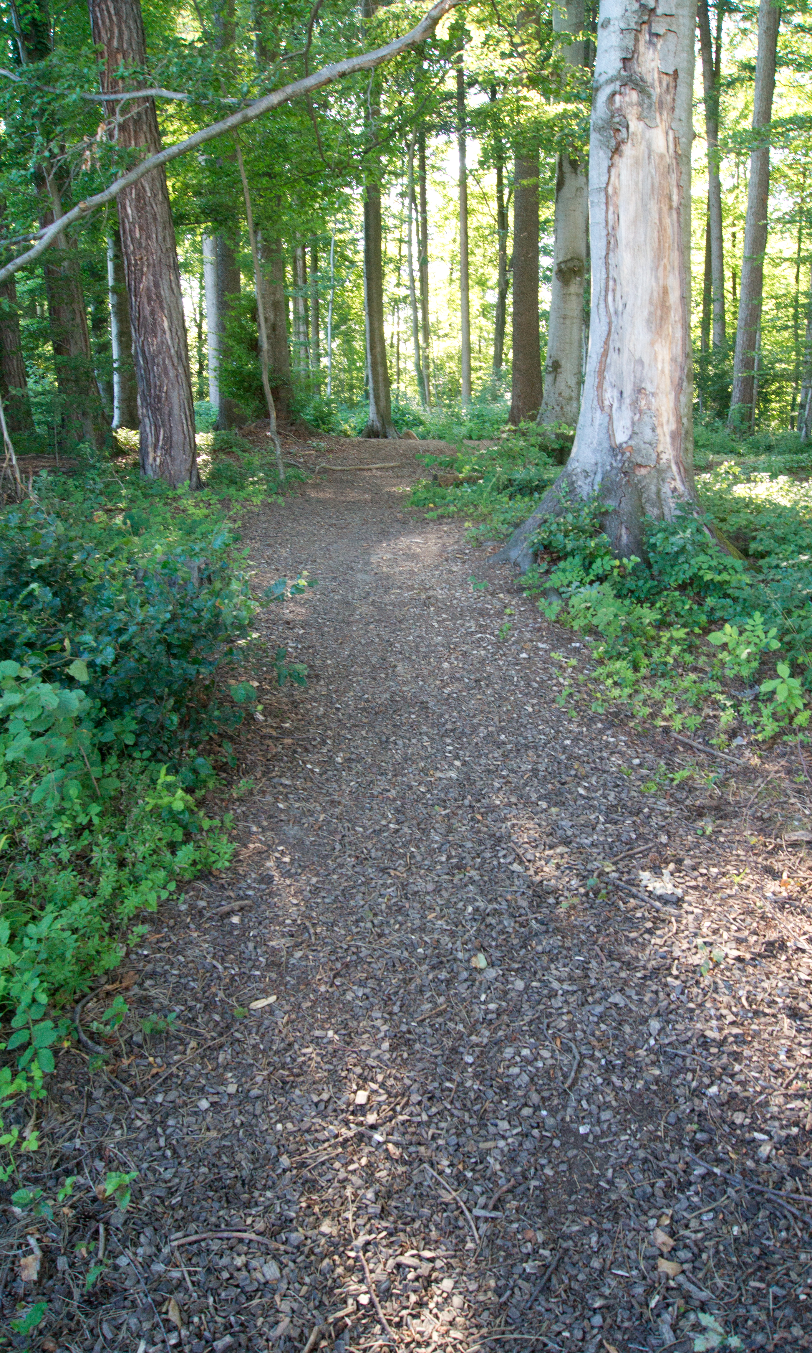 Vieux tronçon de la route cantonale Berne-Lausanne dans le bois des Dailles à Epalinges. This path is indexed in the Inventaire des voies de communication historiques de la Suisse under the reference VD7.1.1.